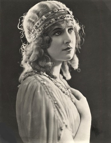 Lillian Hall-Davis, Licia in "Quo vadis?"